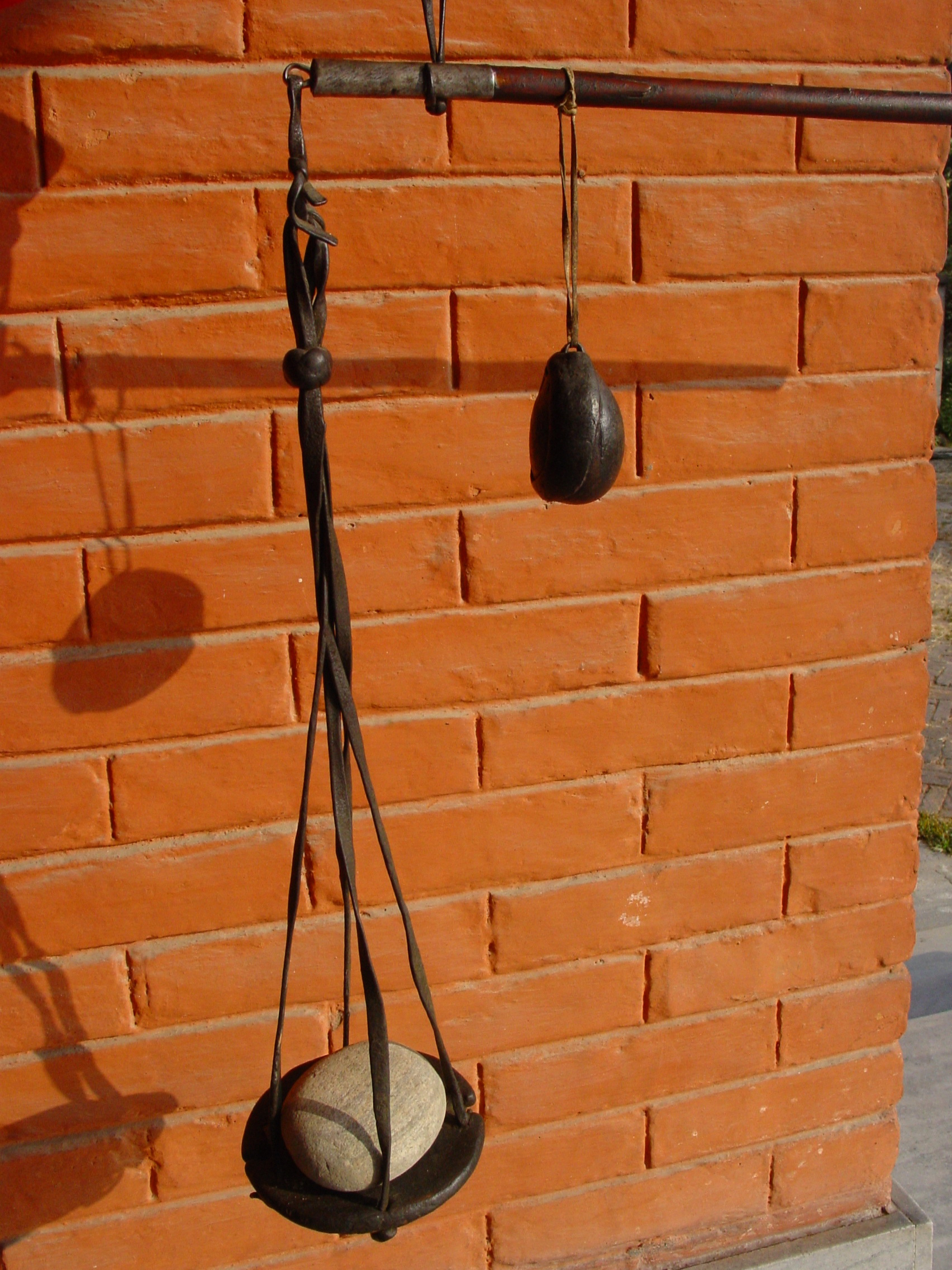 Tibetische Waage